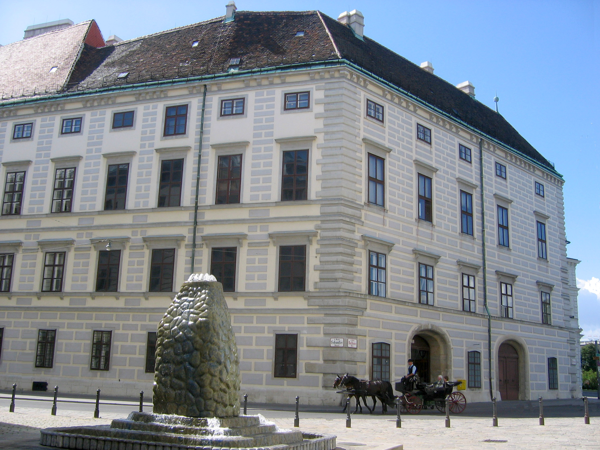 Ballhausplatz1